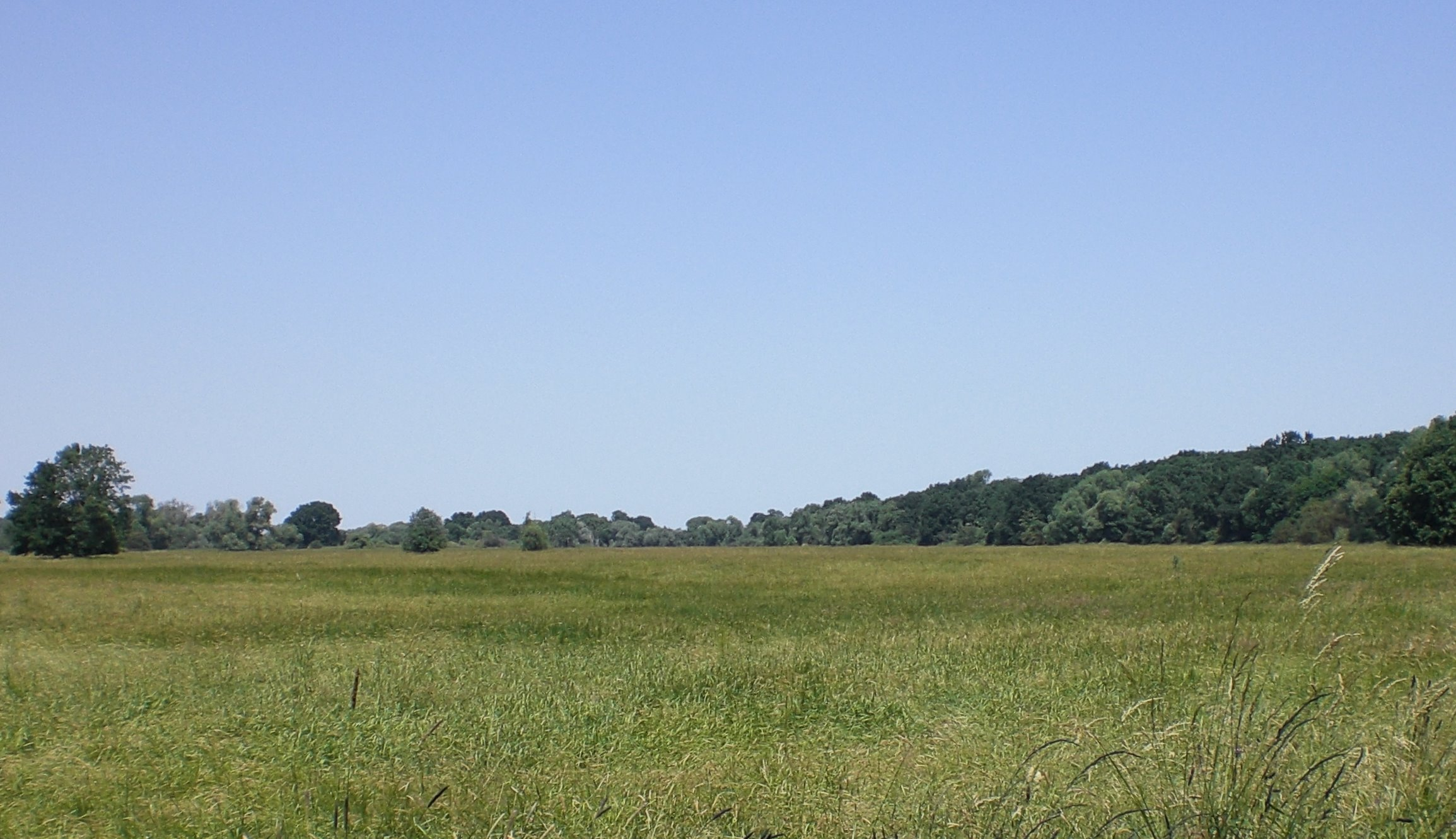 Gelände zwischen Kreuzhorst und Elbe; Bereich im LSG „Mittlere Elbe“